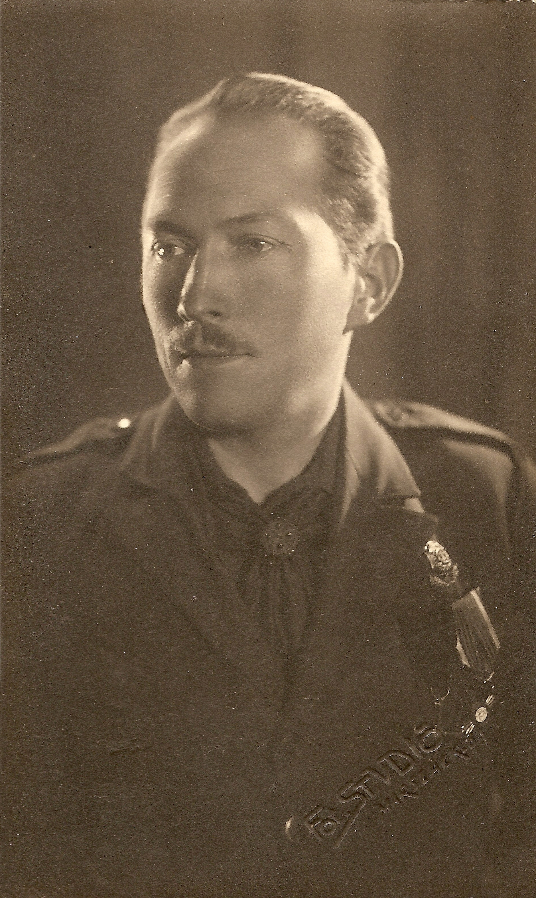 hm. Władysław Olędzki